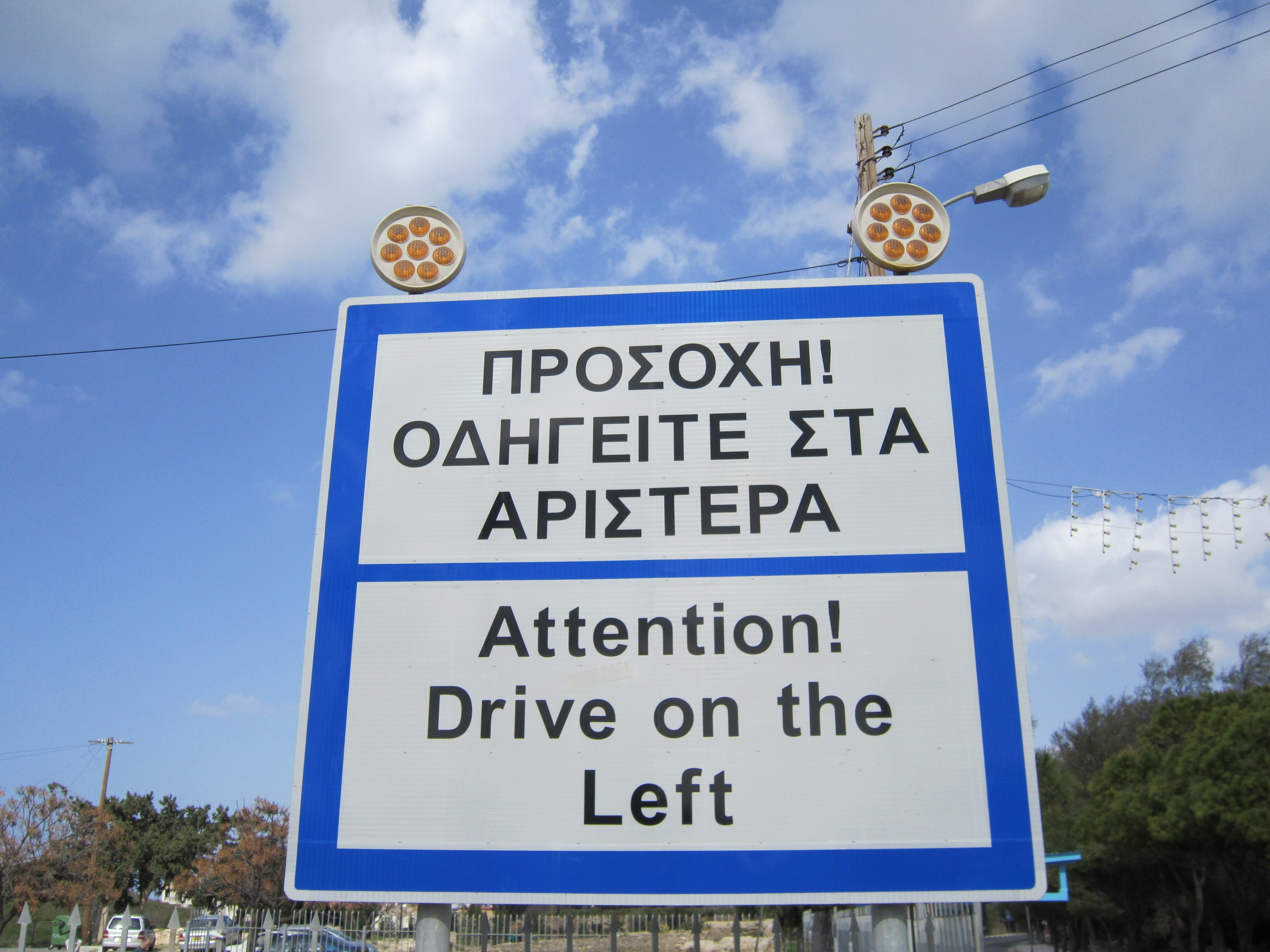 left driving sign on Cyprus